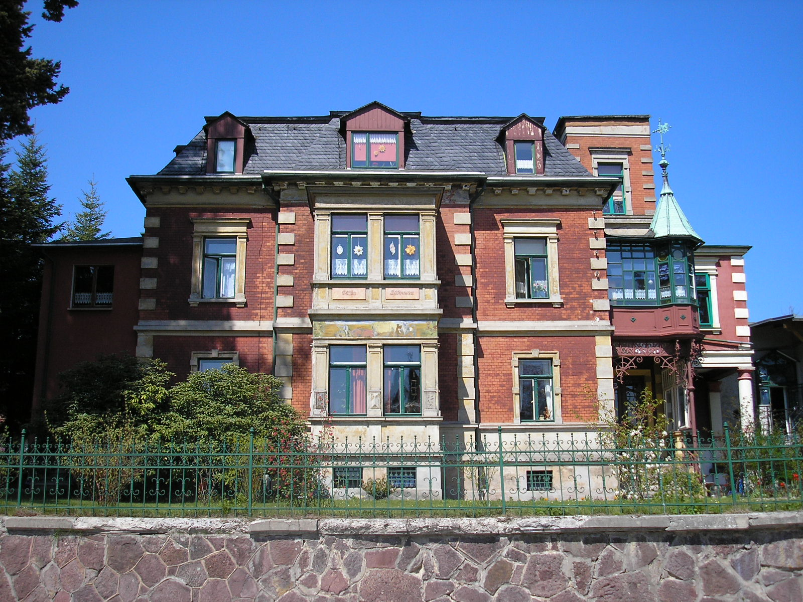 Eine Villa im Kurviertel von Ilmenau (Thüringen).